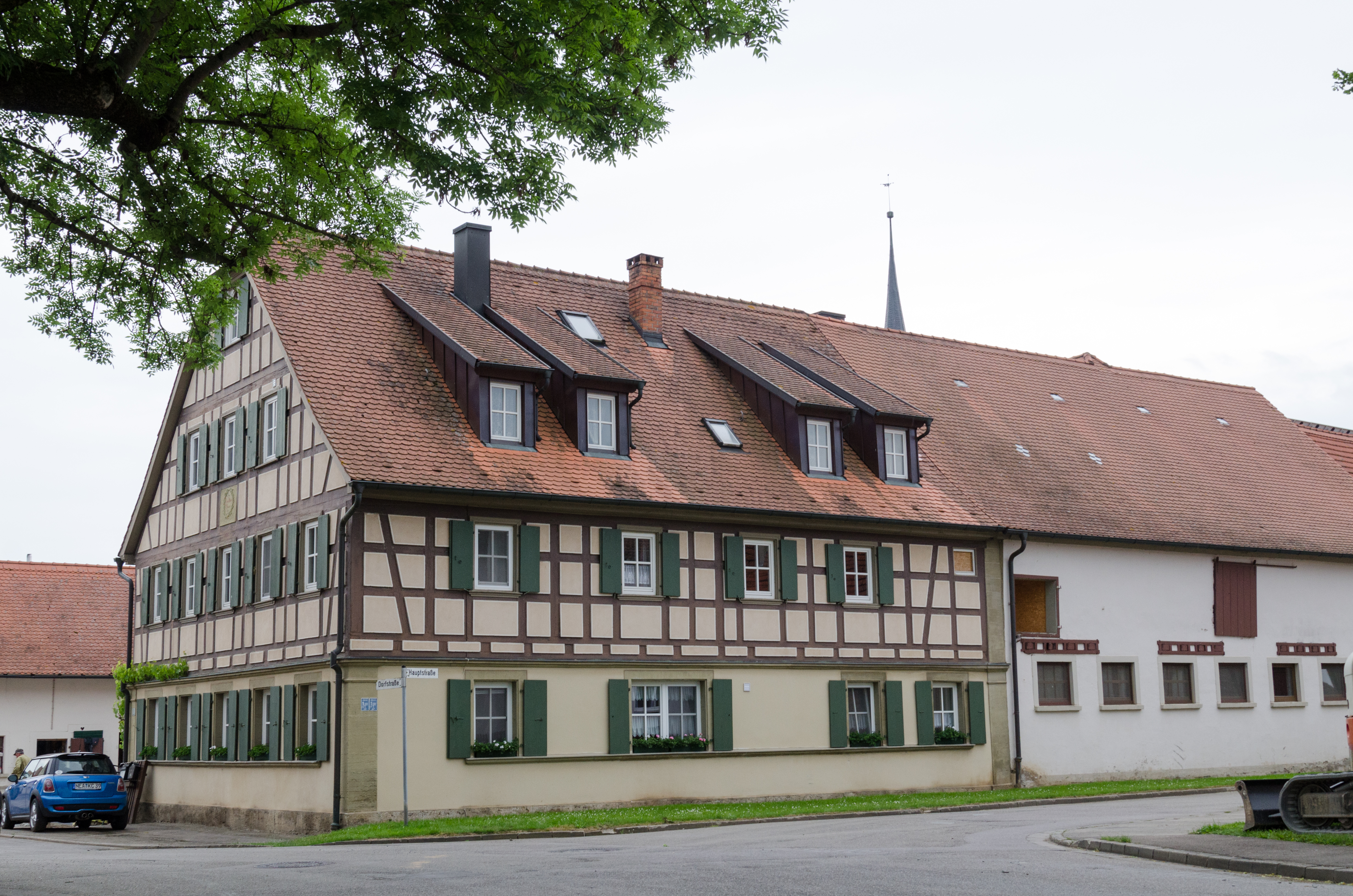 Burgbernheim, Buchheim, Dorfstraße 1